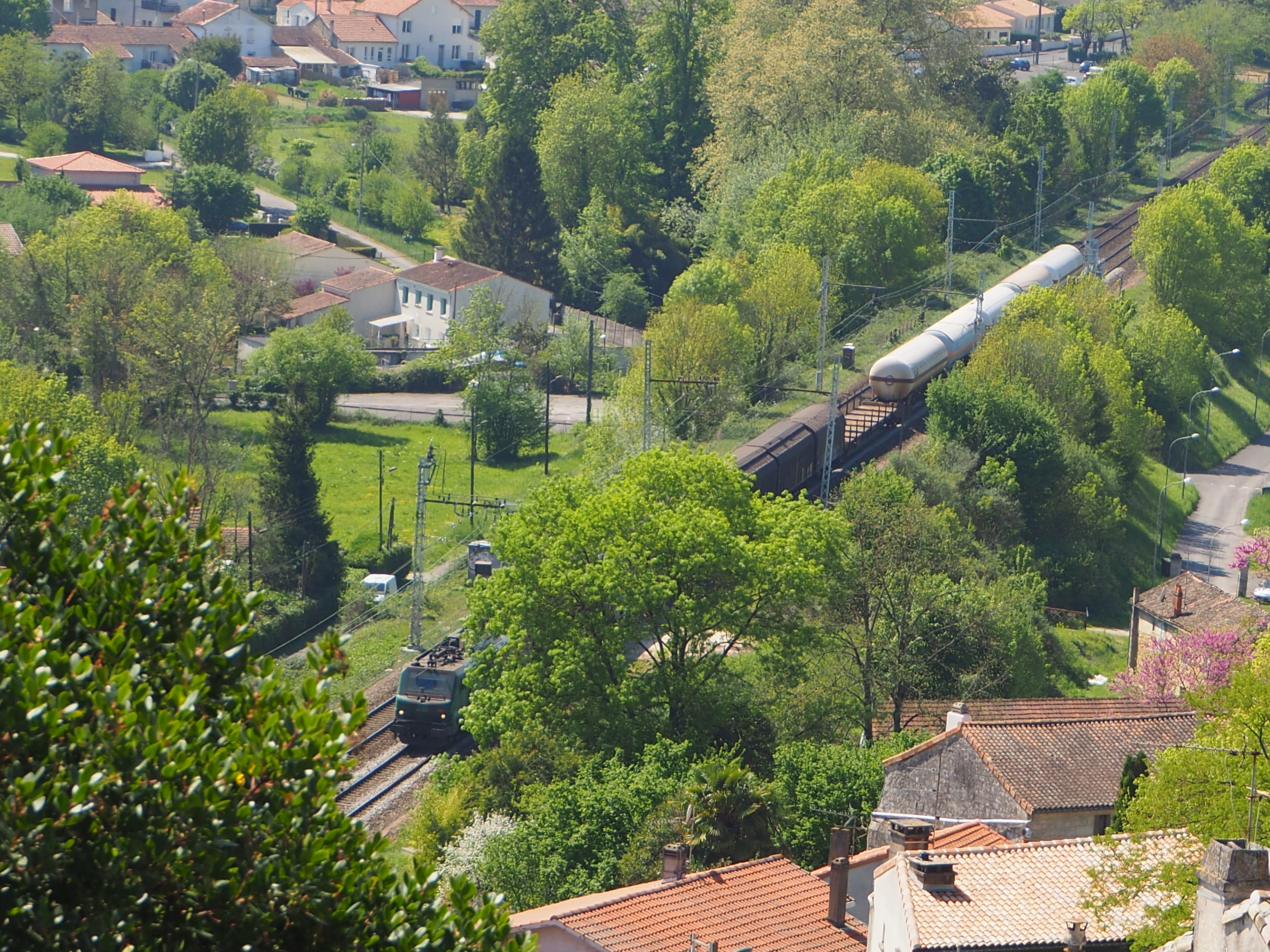 Un train de marchandise en provenance de Bordeaux se présente à l'entrée sud du tunnel ferroviaire d'Angoulême.